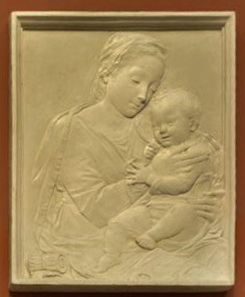 Madonna Panciatichi ( 1453 ), Desiderio da Settignano. Firenze, Museo del Bargello